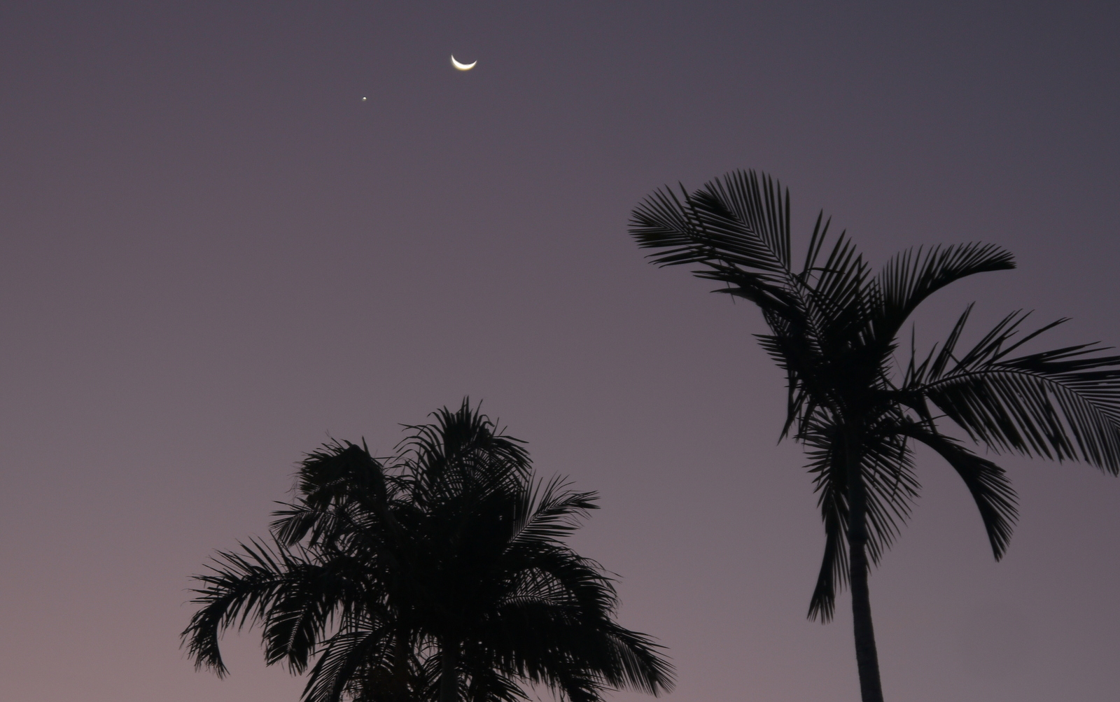 Quartier de lune croissante à Mission Beach Australie le 16 juillet 2018